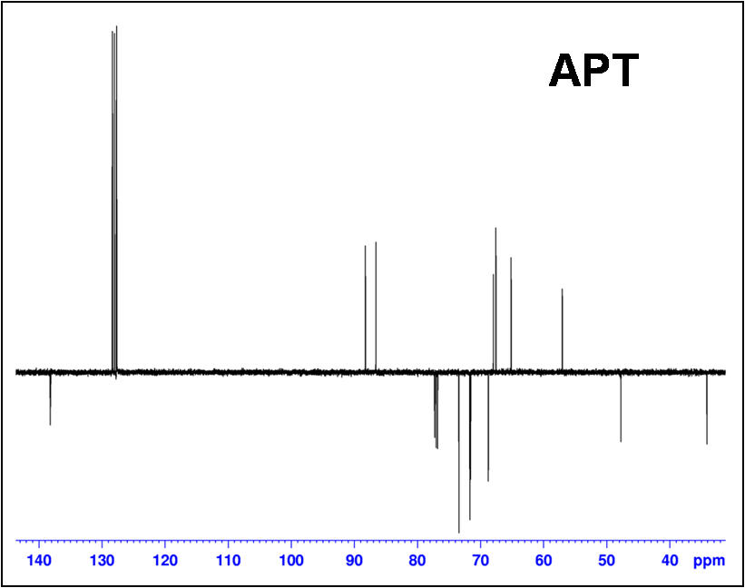 Espectro APT de RMN